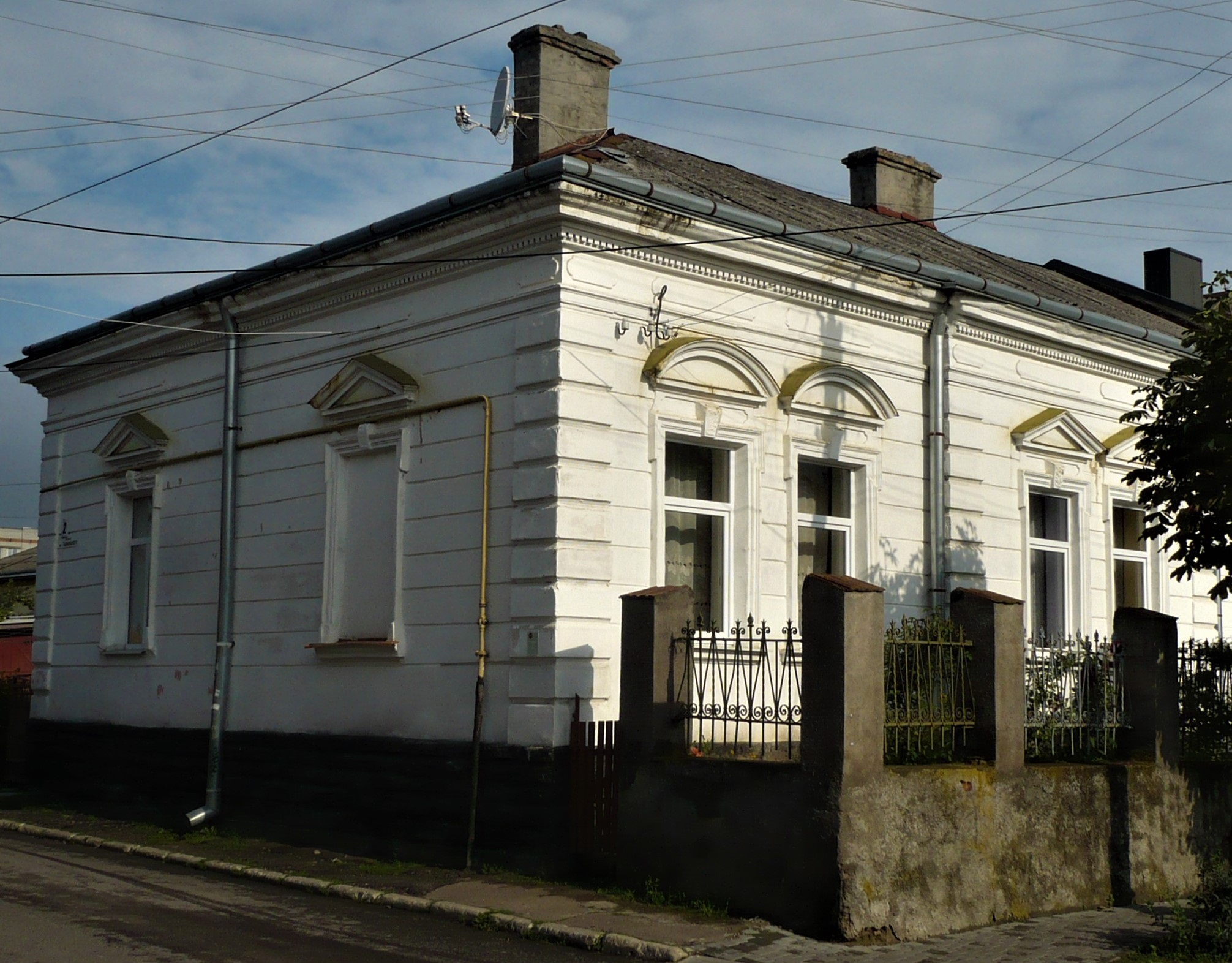 Dom w Złoczowie